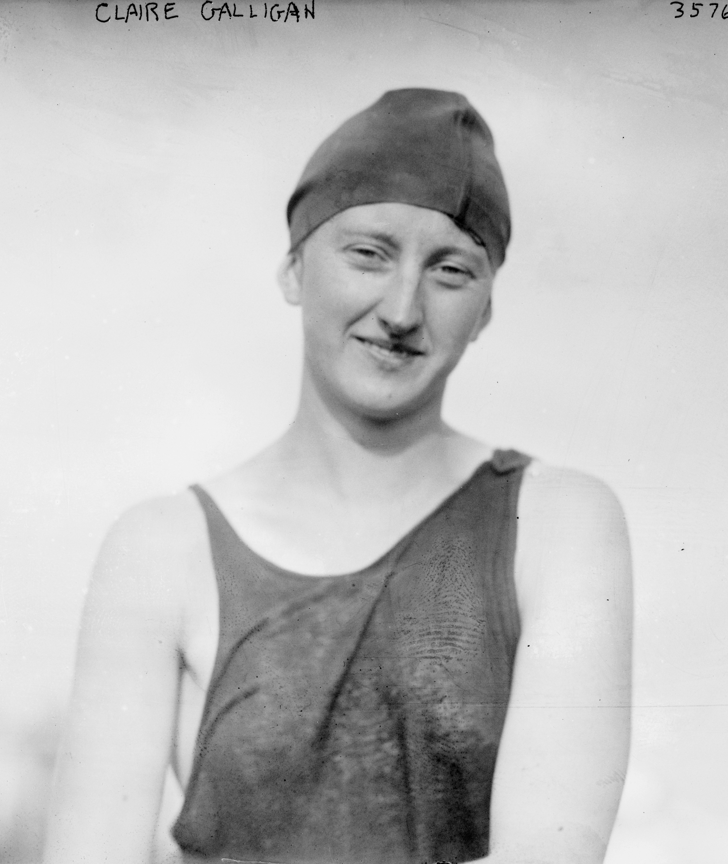 Claire Galligan